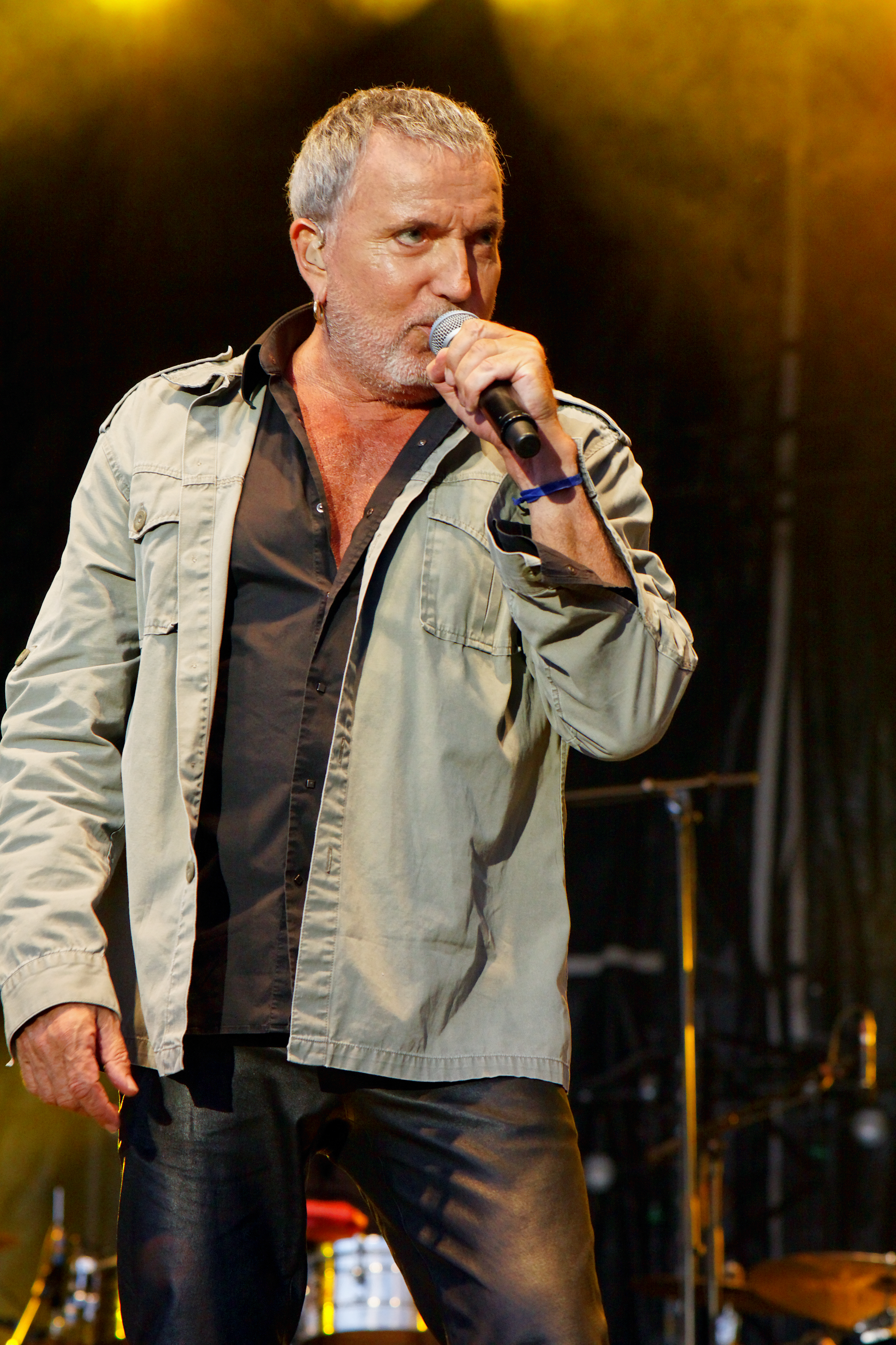 Bernard Lavilliers en concert sur la scène Landaoudec lors du festival du bout du Monde à Crozon dans le Finistère (France).